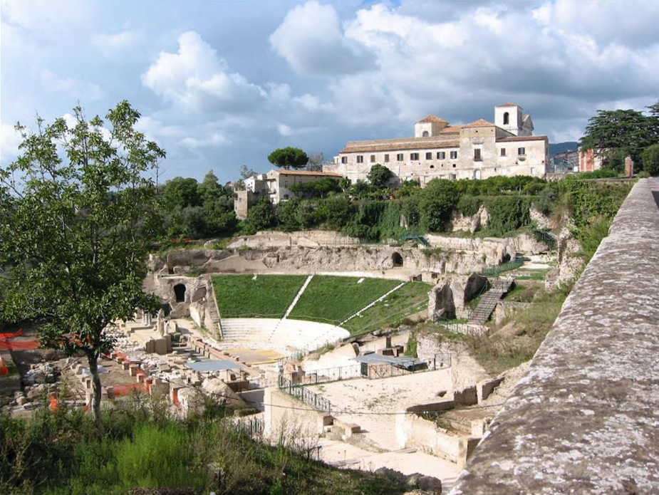 Teatro Romano - Sessa Aurunca (CE). Portato alla luce e restaurato tra il 1999 e il 2003, è uno degli edifici pubblici di età romana più imponenti scoperti in Campania. Fu costruito nel I secolo d. C., sotto l'impero di Augusto, e restaurato ed ampliato nel II secolo d.c. L'edificio, con murature conservate fino a 20 metri d'altezza, comprende una cavea di 110 metri di diametro, con gradinate in calcare che potevano ospitare da 7000 a 10000 spettatori. Consistenti sono anche i resti dei velarium, che proteggevano gli spettatori dal sole, e del grande edifico scenico, lungo 40 metri e con tre ordini sovrapposti di 84 colonne. La scena era un vero museo a cielo aperto dove gli artisti e gli scalpellini romani usarono molte qualità di marmi per realizzare le decorazioni architettoniche costituite da fregi, architravi e capitelli scolpiti. Le colonne furono realizzate con marmi provenienti dalla Numidia, dall'Egitto e dalla Grecia, mentre i capitelli con marmi di Carrara e di Atene. Molte le sculture e le iscrizioni dedicatorie decoravano il teatro. Ricordiamo le statue di Livia, moglie di Cesare Augusto, Agrippina maggiore, madre di Caligola, le sculture di Matidia maggiore, Sabina, Plotina e di Matidia minore.